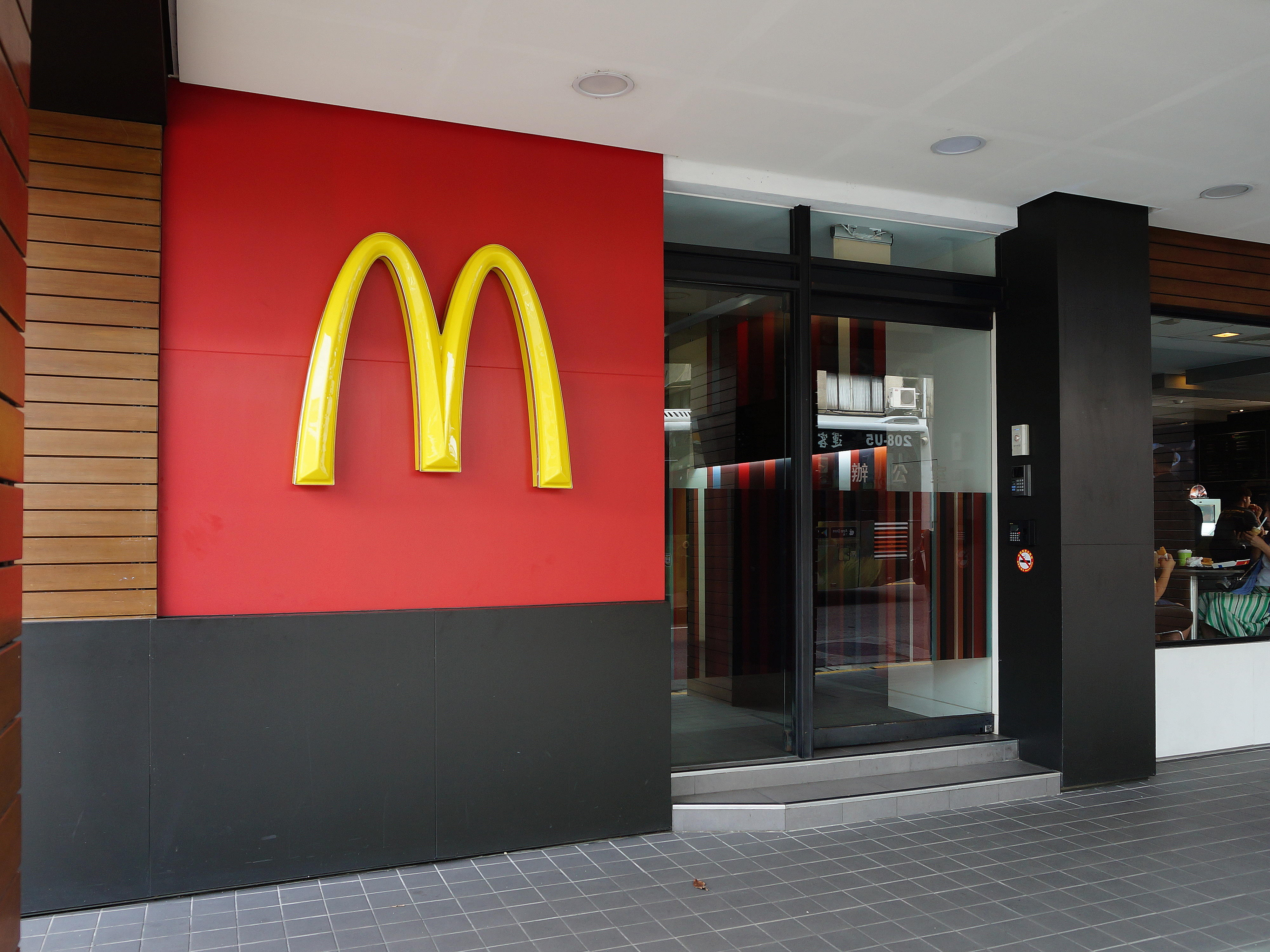 臺灣麥當勞餐廳總部，地址：臺北市中正區林森南路1號（臺灣麥當勞餐廳林森二店）。